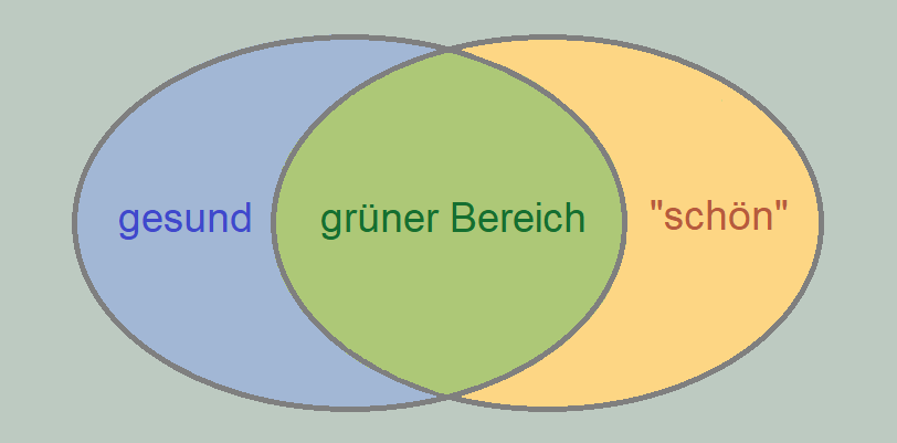 Schnittmenge